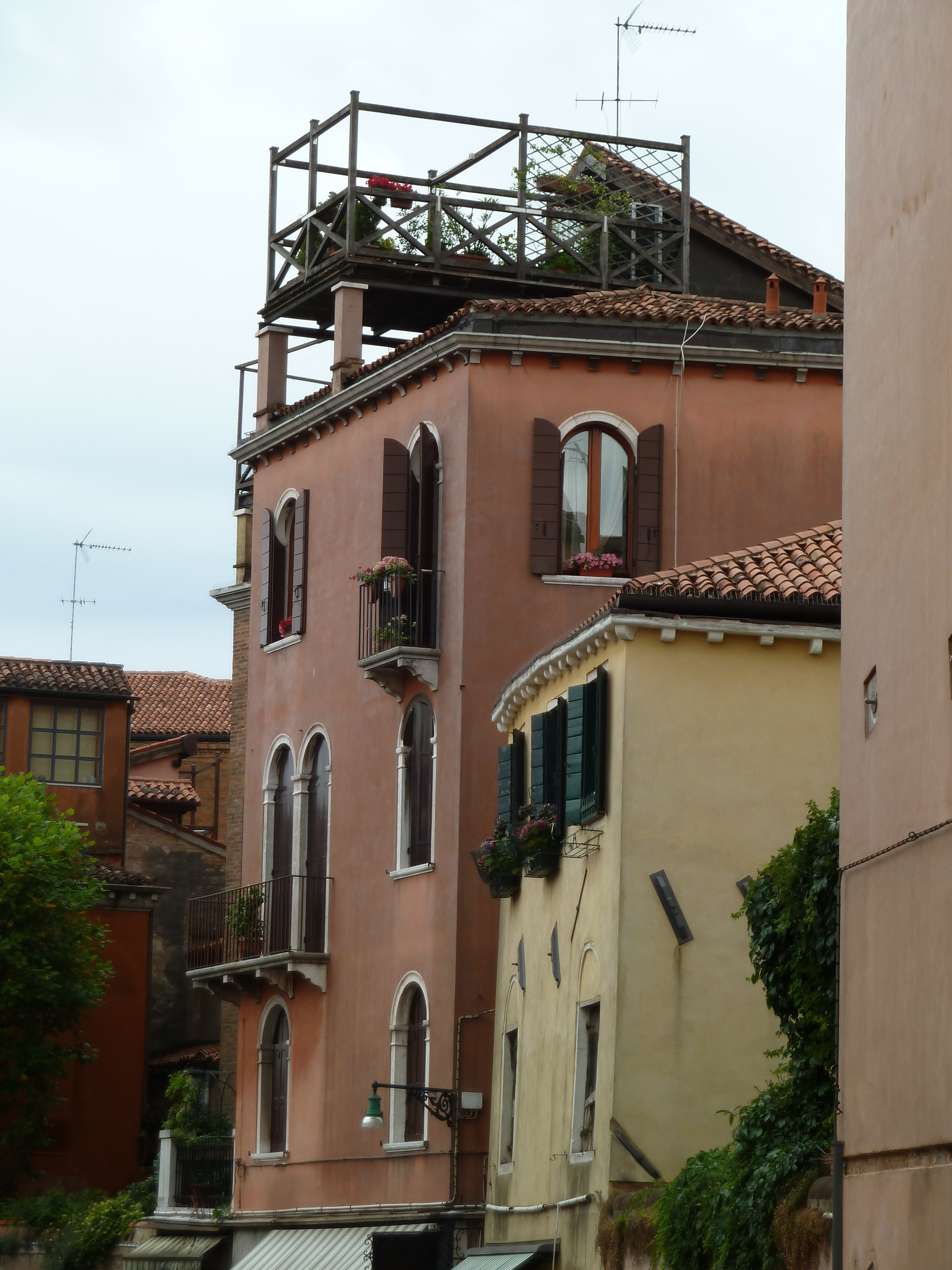 Roof terraces in Venice